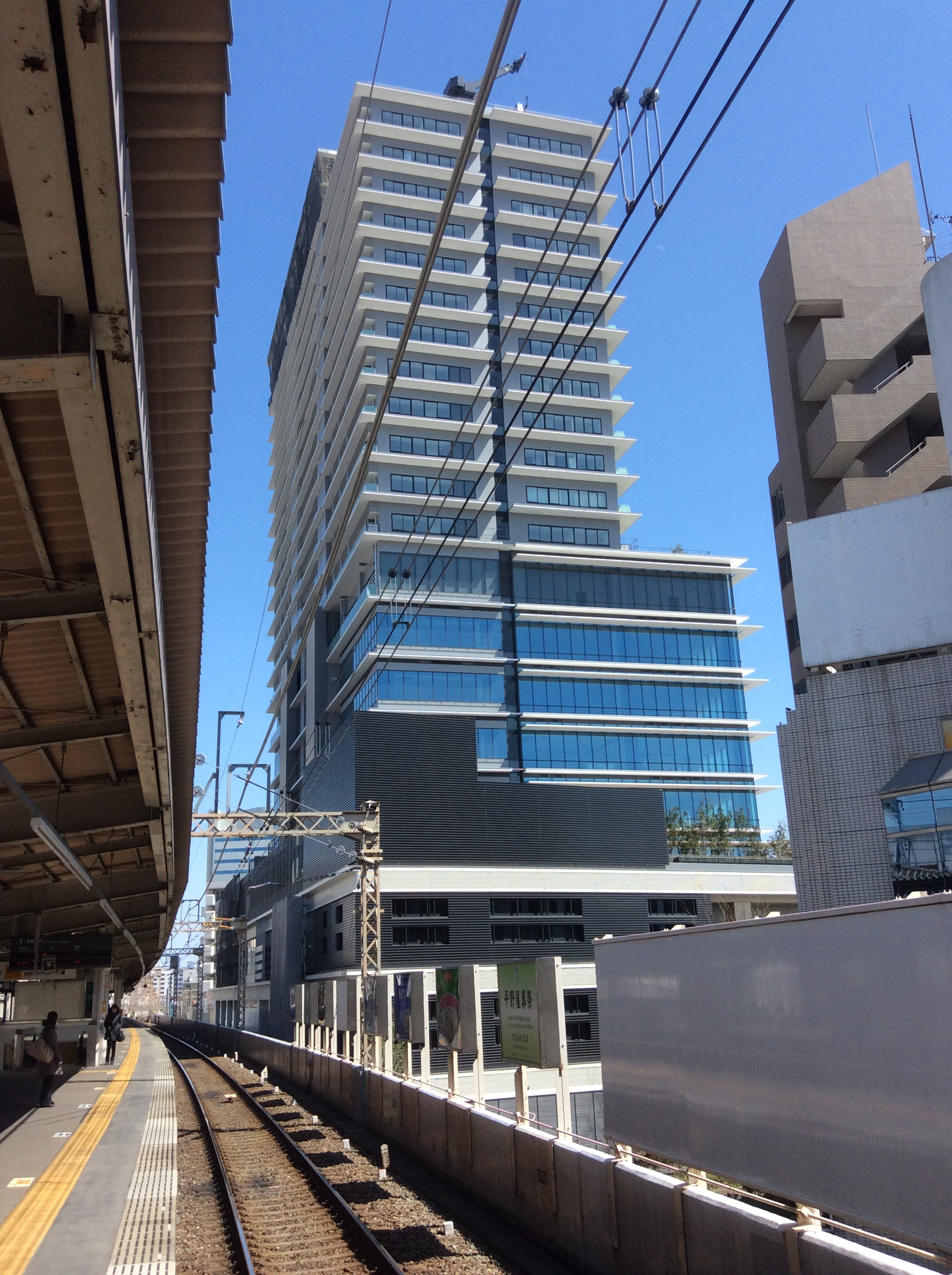 （2015年3月25日撮影）